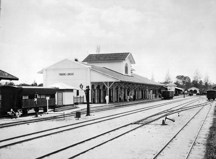 Foto. Treinstation Timbang Langkat met enkele treinwagons op de sporen